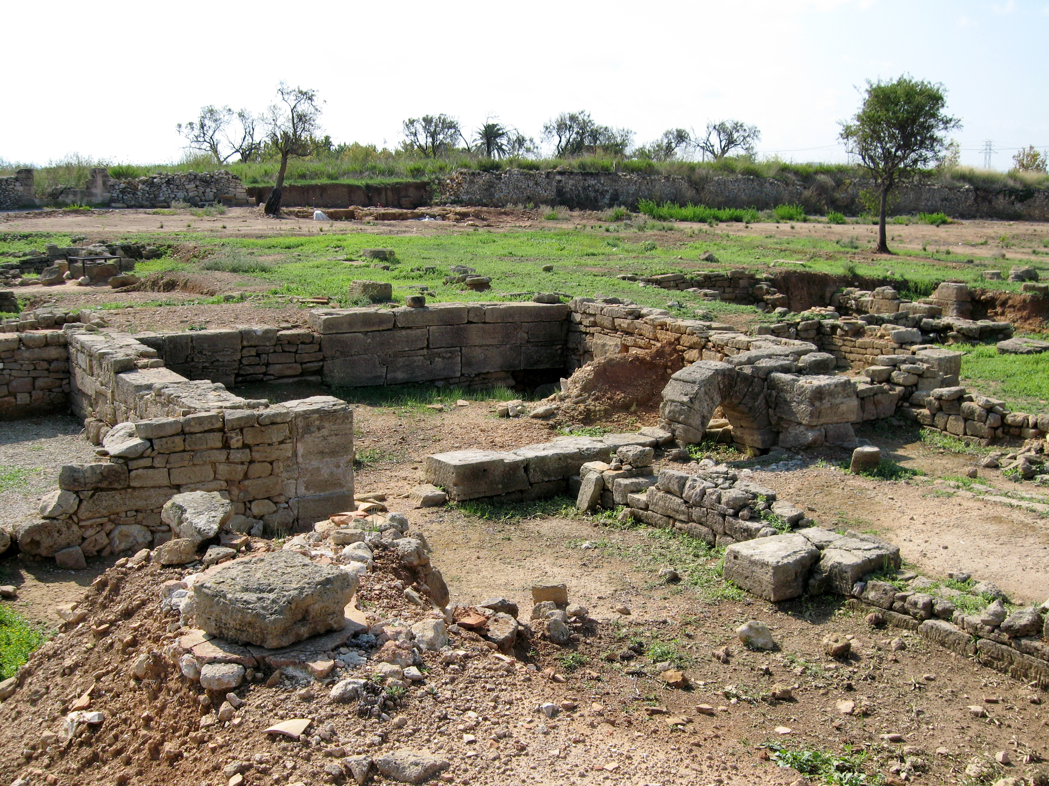 Ruinen der antiken Stadt Pollentia (katalanisch: Poŀlèntia), Gemeinde Alcúdia, Mallorca, Spanien